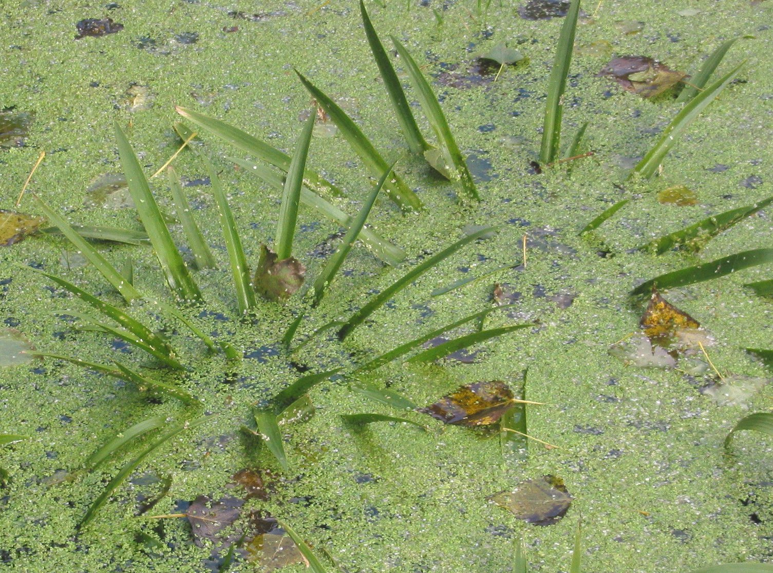 (nl: krabbenscheer) Stratiotes aloides